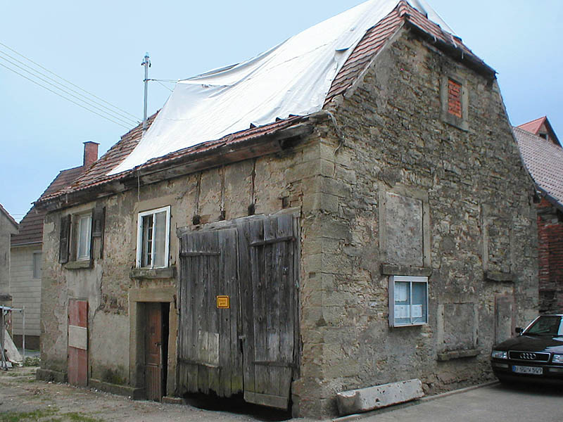 Ehem. Synagoge in Massenbachhausen